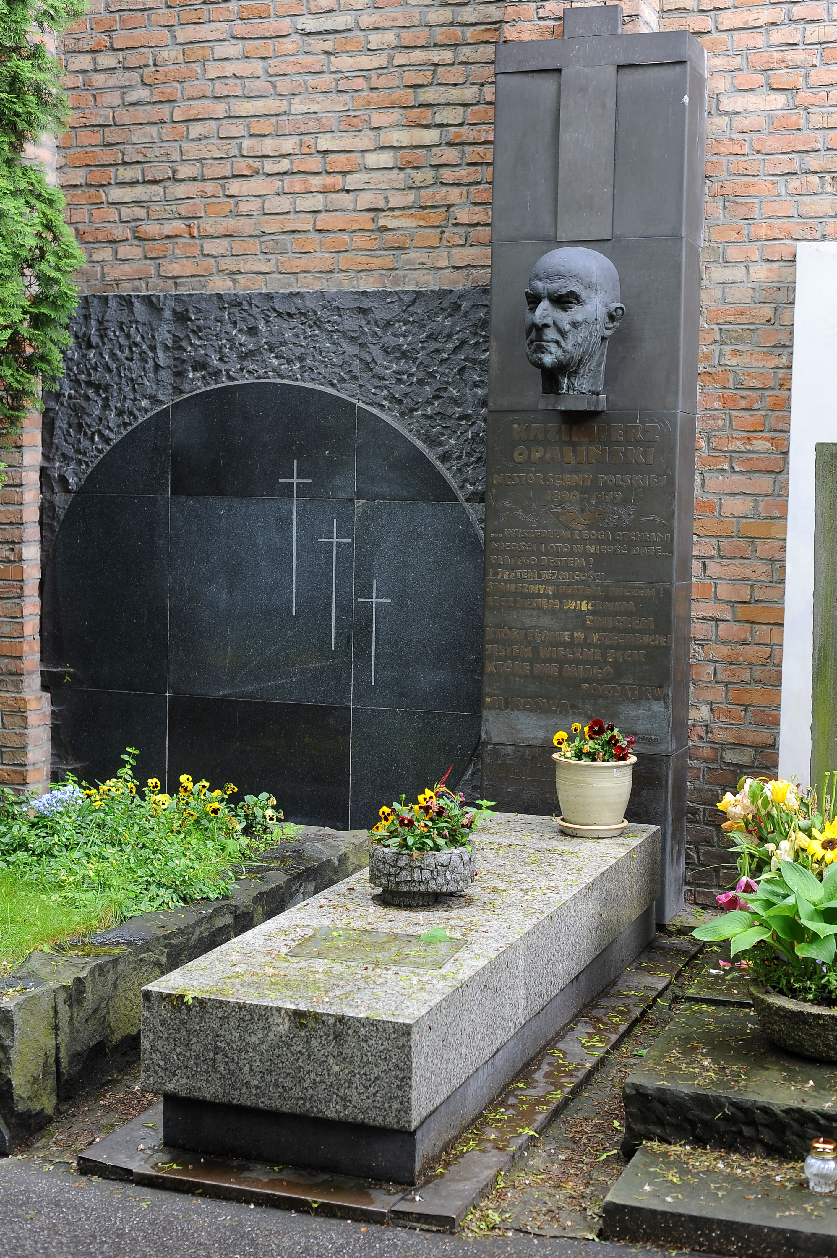 Grób aktora Kazimierza Opalińskiego na warszawskim Cmentarzu Powązkowskim.